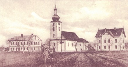 Kościół p.w. Matki Bożej Śnieżnej wybudowany z 1789 w Zarzeczu, zalany w 1955 przez Zbiornik Goczałkowicki